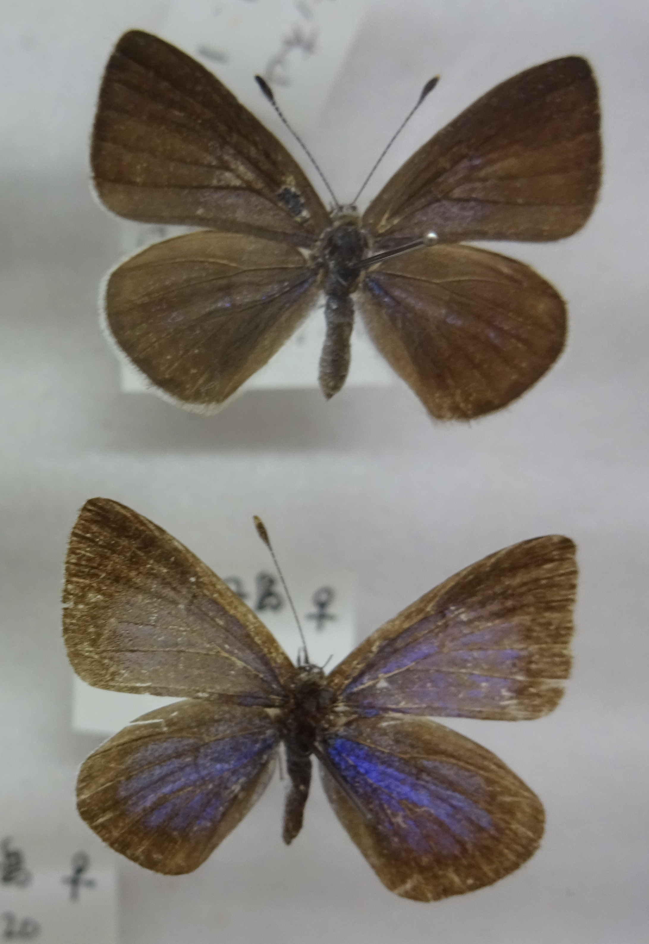 オガサワラシジミ